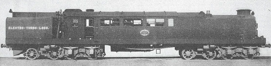 Lokomotive von Reid und Ramsay mit turbo-elektrischem Antrieb, gebaut 1910 von der North British Lokomotive Co., Glasgow.